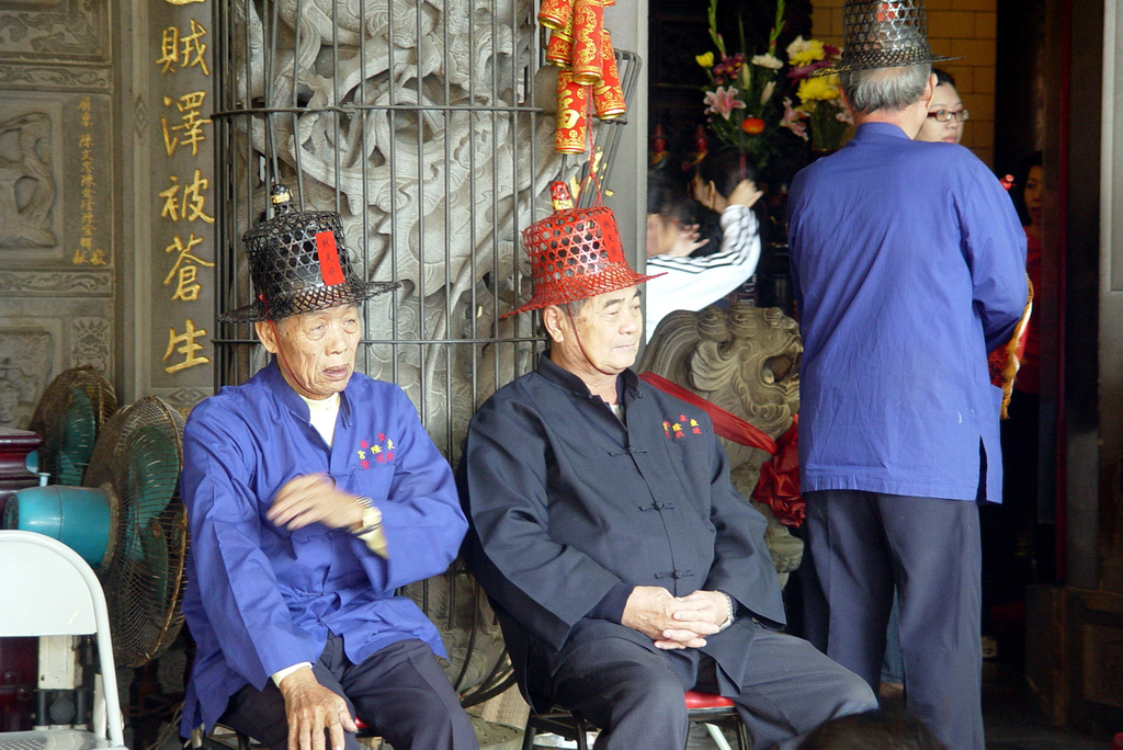 台灣東港鎮東隆宮的班頭